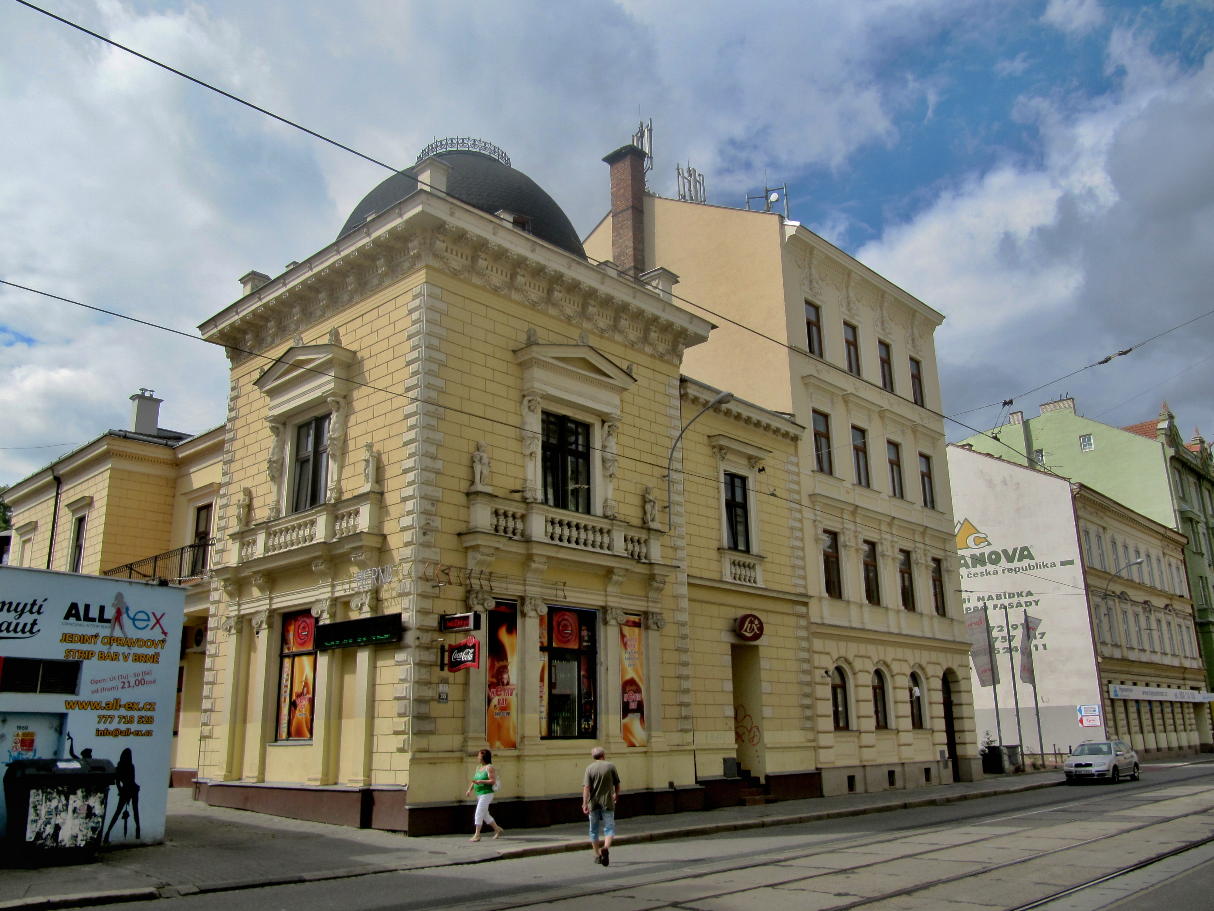 Palác Sidonie (Brno), Staré Brno, Hybešova 259/21, Brno